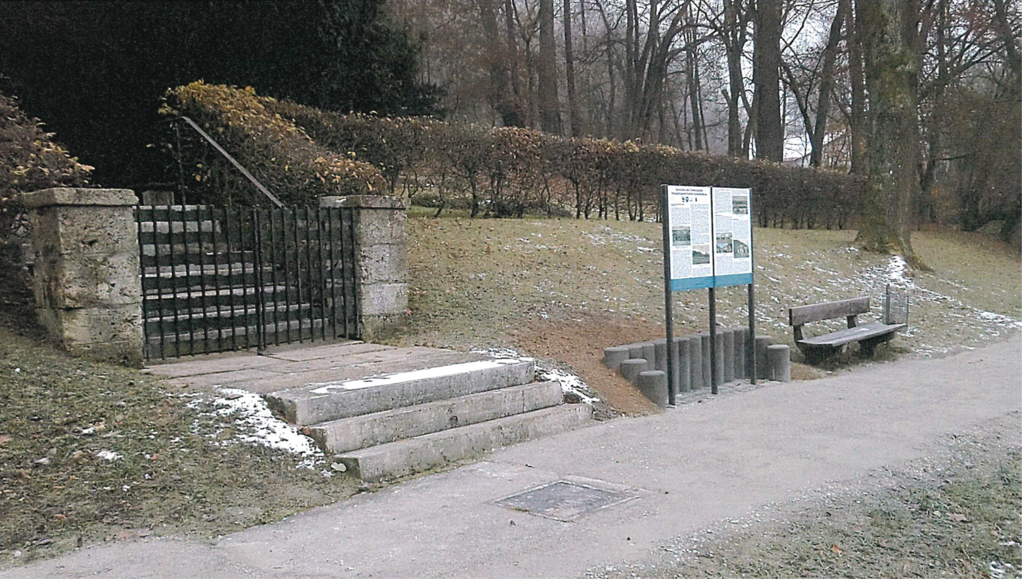 Kriegsgefangenfriedhof am Kloster Fürstenfeld (Henrik-Moor-Weg)